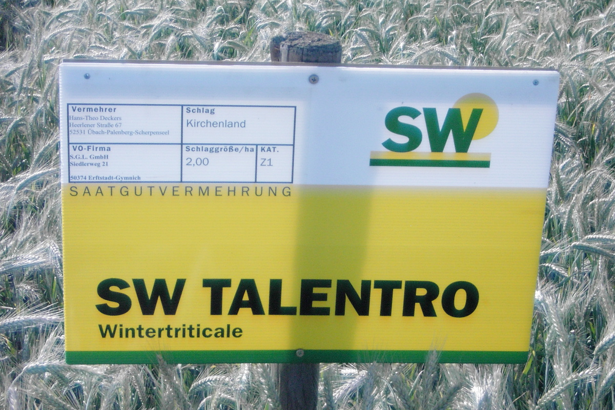 Triticale Vermehrung in Grotenrath